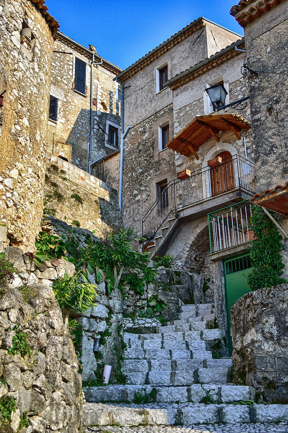 Via Cannesse